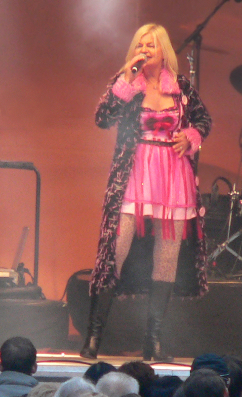 Frl. Menke